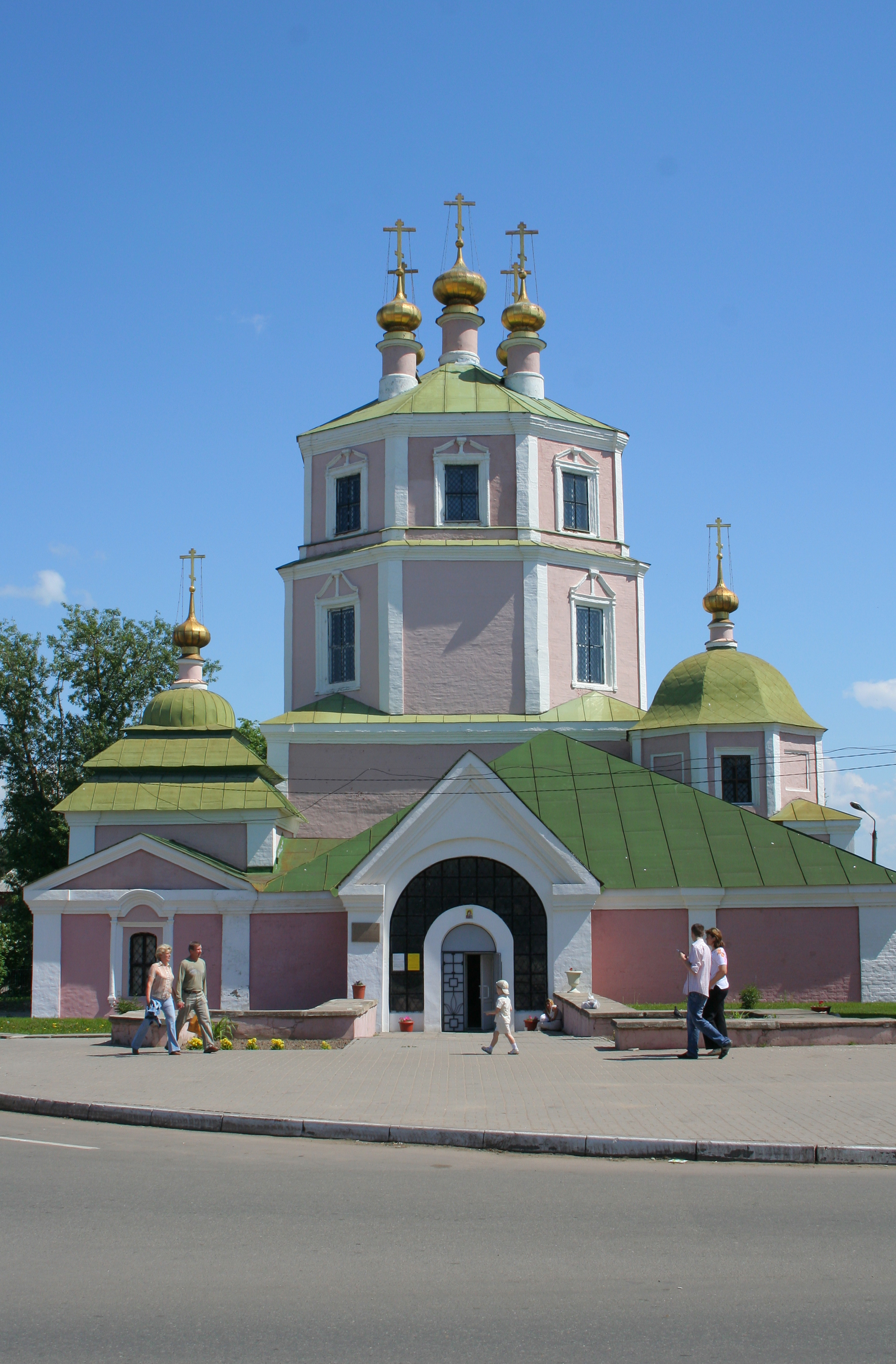 Stadt Gagarin (ehem. Gschatsk), Oblast Smolensk, Russland. Kirche der Gottesmutter von Kasan.